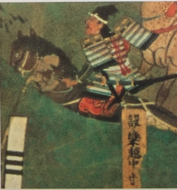 長篠合戦図屏風（豊田市郷土資料館蔵 浦野家旧蔵）